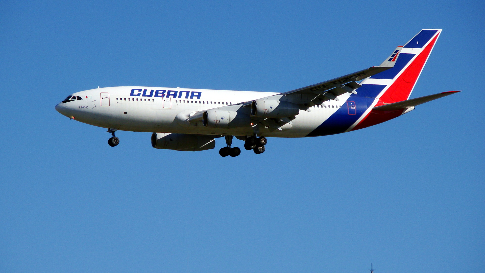 Ilyushin Il-96-300 (CU-T1250) de Cubana de Aviación aterrizando en el aeropuerto Adolfo Suárez Madrid-Barajas.